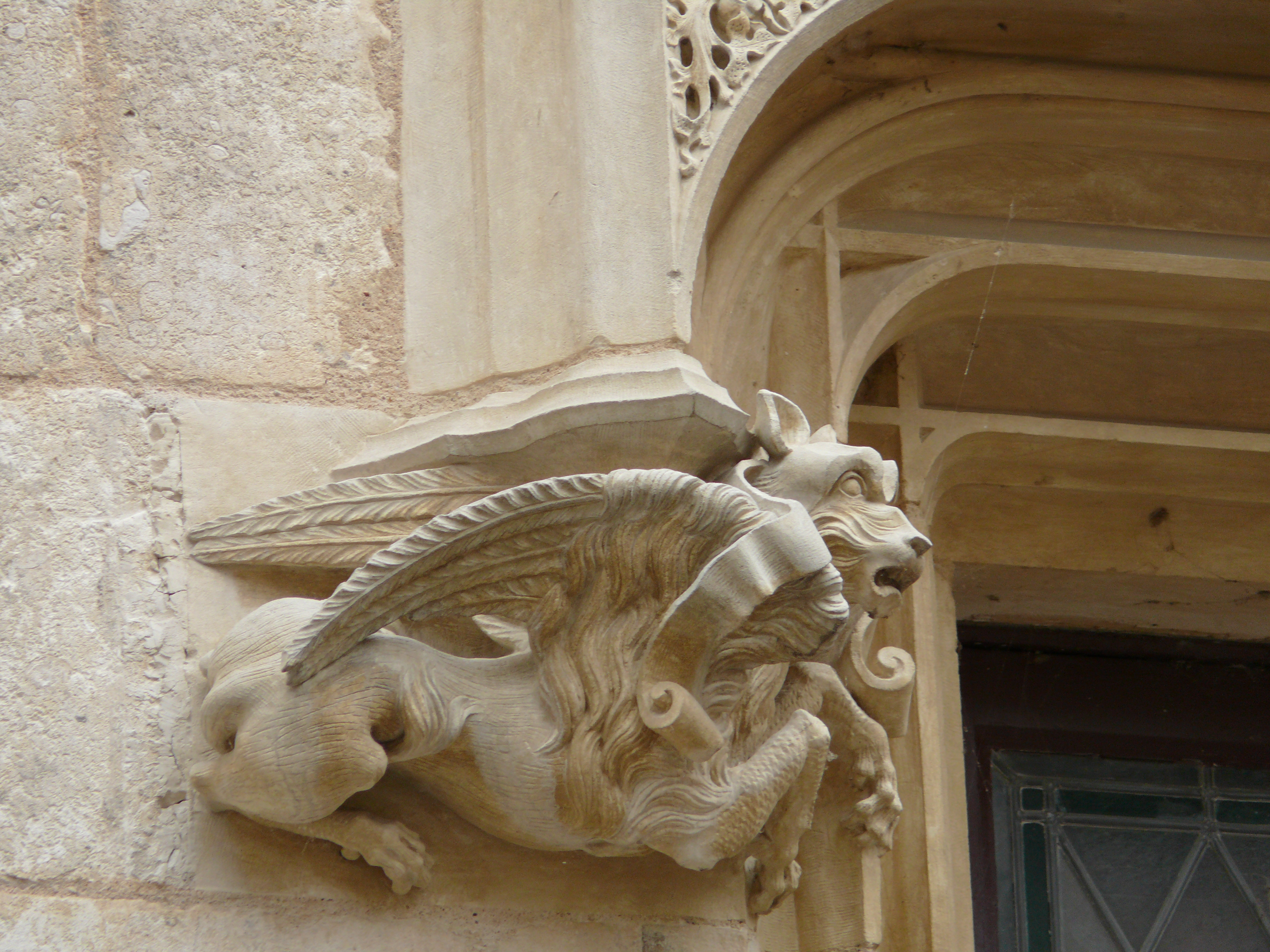 Bourges - Hôtel Lallemant - Décoration d'une fenêtre sur cour après restauration